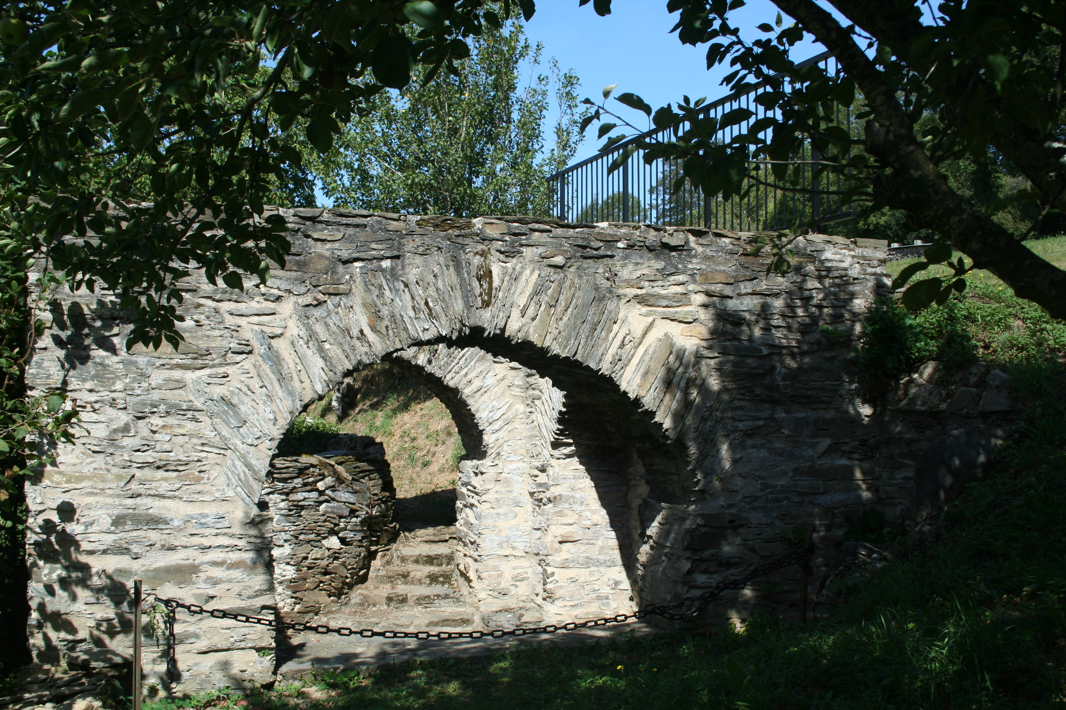 Senaux (Tarn) - fontaine romane (vue générale).